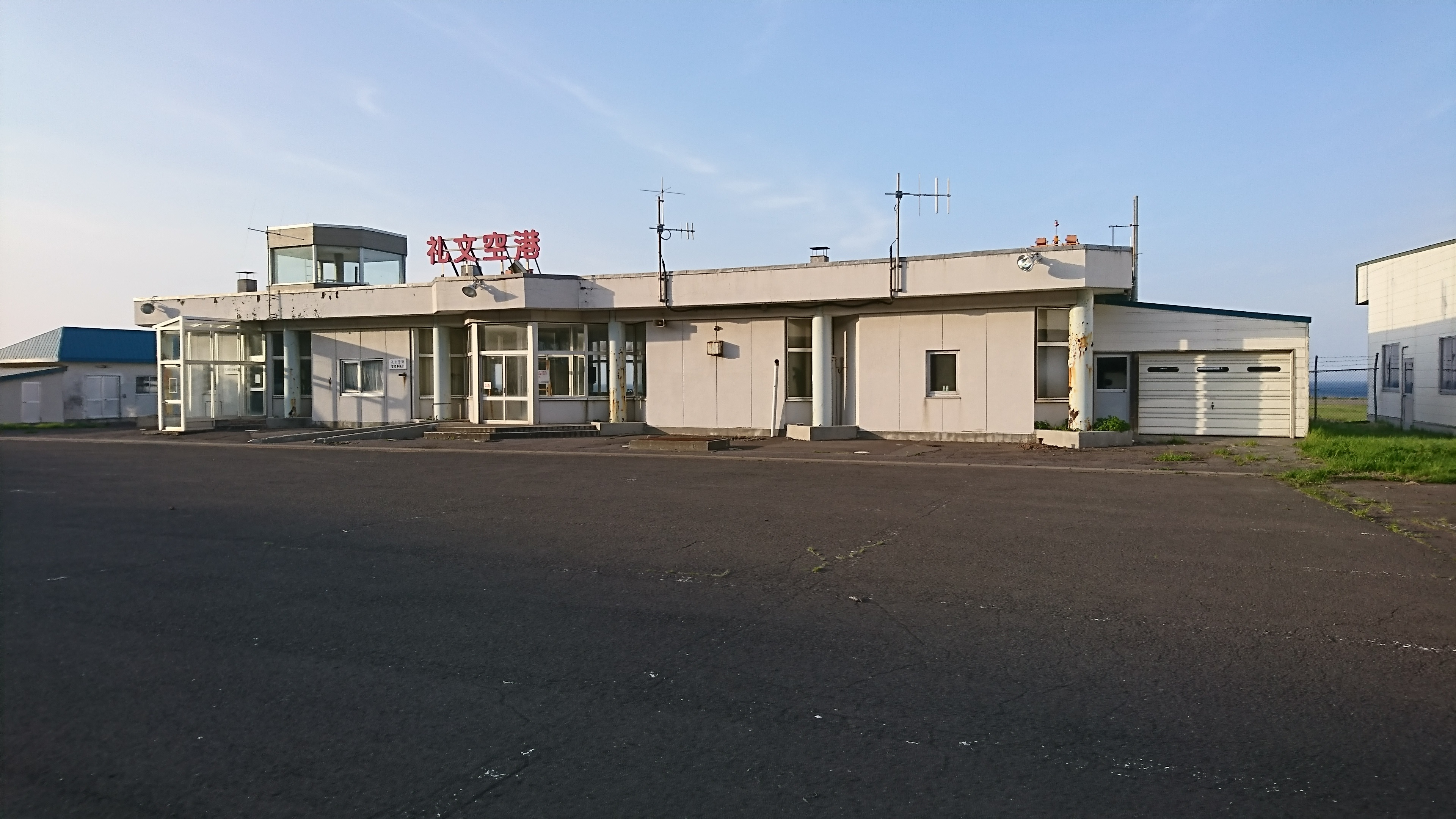 礼文空港ターミナル